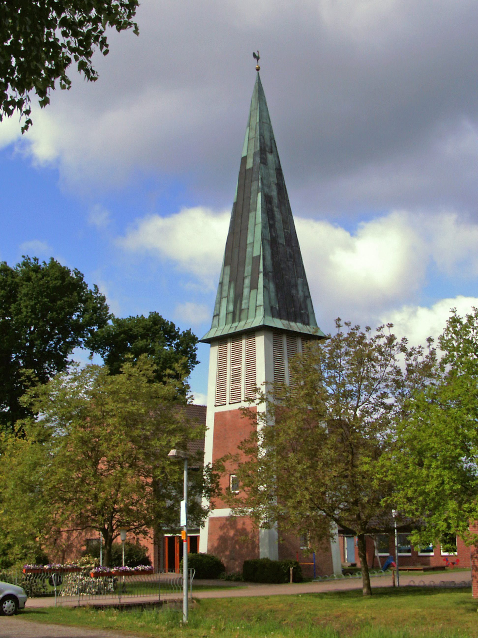 Evangelische Thomaskirche in Neudorf-Platendorf, Landkreis Gifhorn.